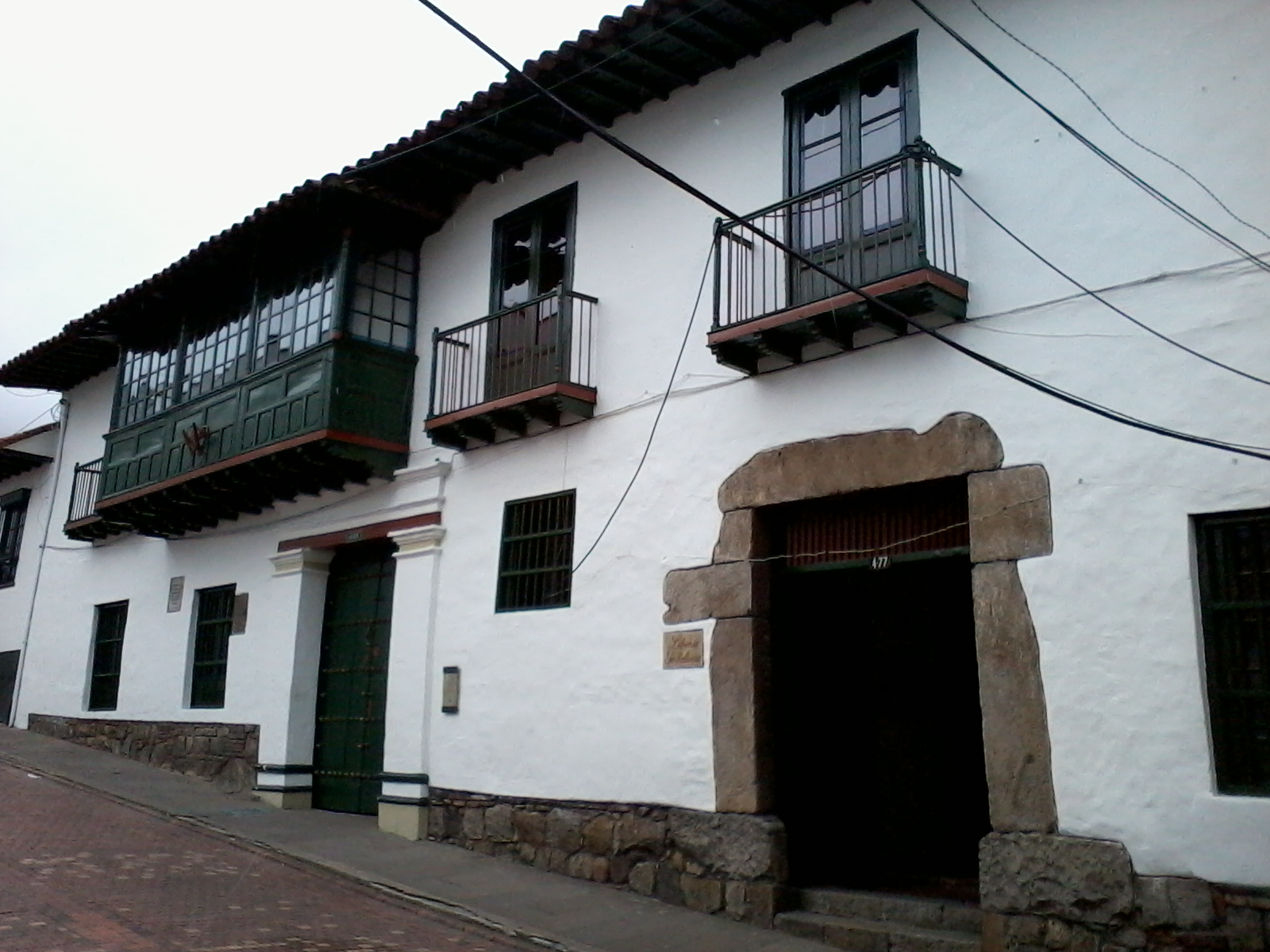 Casa natal de Rufino José Cuervo. Sede del Instituto Caro y Cuervo. Calle 10 N° 4-63, Bogotá (Colombia)